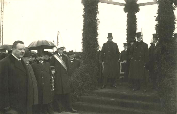 Invigningen av Stockholms frihamn 10 oktober 1919. På bilden syns från vänster direktör Magnusson, finansminister Thorsson och landshövding Edén. Från höger H.K.H. Prins Carl, H.K.H. Kronprins Gustaf Adolf, H.K.H. Kronprinsessan Margareta och H.M. Konungen Gustaf V.